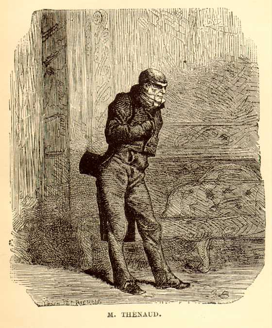 Thénardier se faisant passer pour « M. Thénard ».